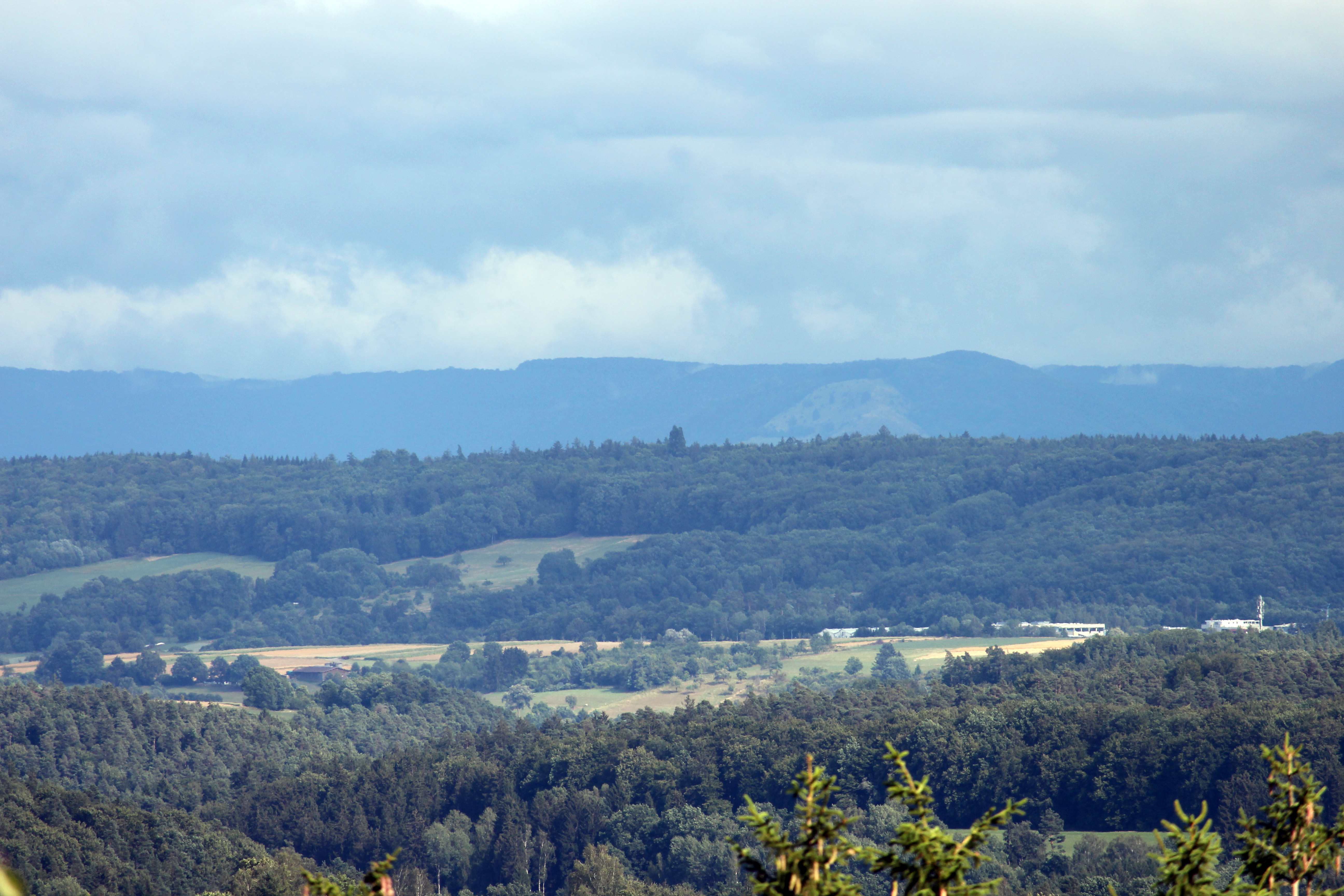 Die drei Mammutbäume im Bildzentrum überragen deutlich. Da sie nur leicht versetzt aus Blickrichtung Schönaich, Aussichtsplatte vom First, erscheinen, wirken sie fast wie ein einzelner Baum. Links dahinter der Jusiberg, Albtrauf. Entfernung Fotoapparat/Baum rund 10km.